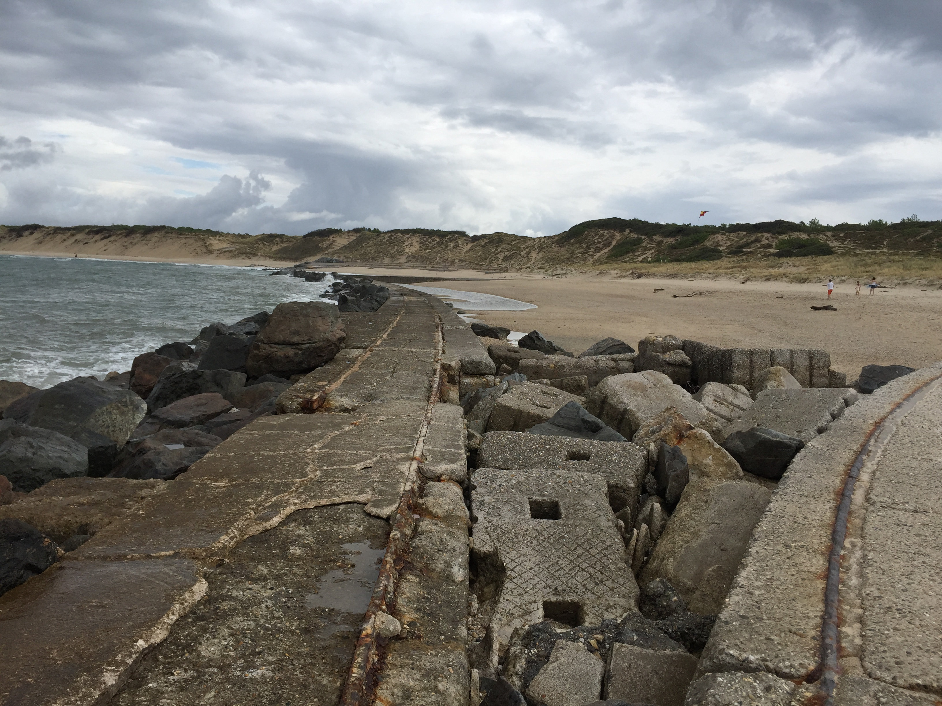 Les anciennes digues réapparaissent aux Arros en piteux état